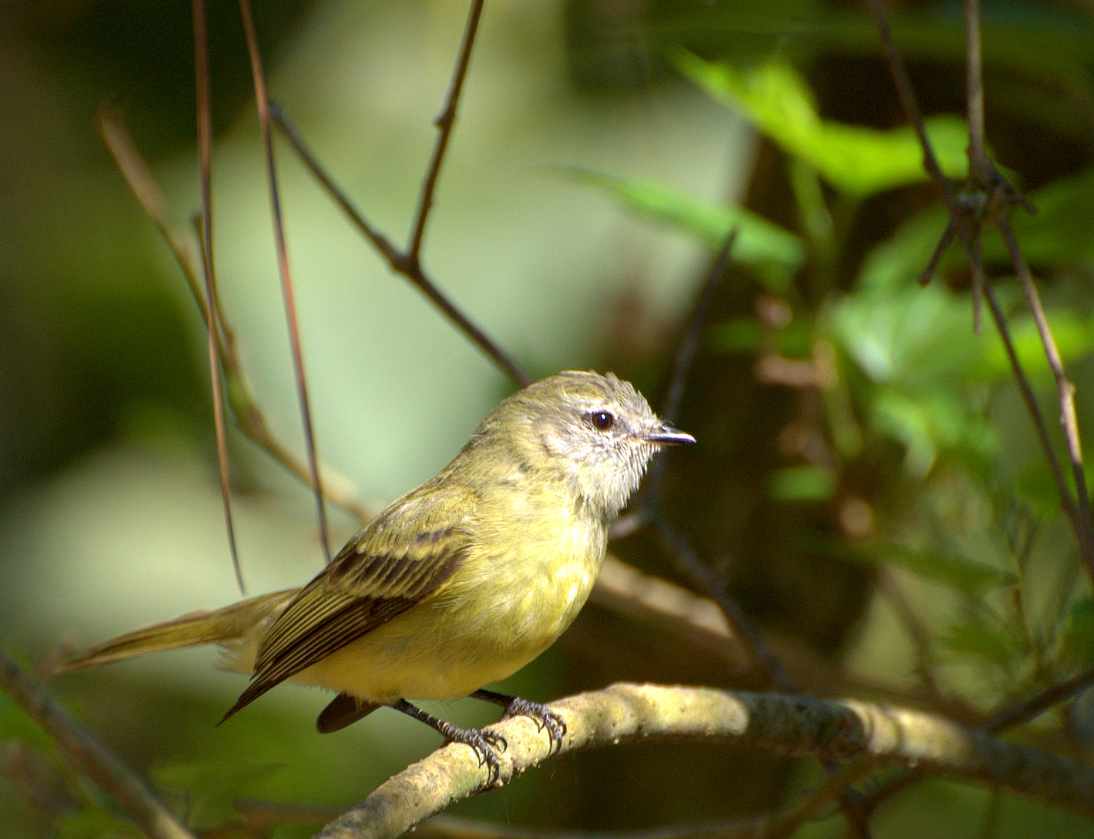 Planalto Tyrannulet (Phyllomyias fasciatus) Horto Florestal de São Paulo